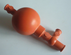 Pipetteerballon - eigen werk - PD